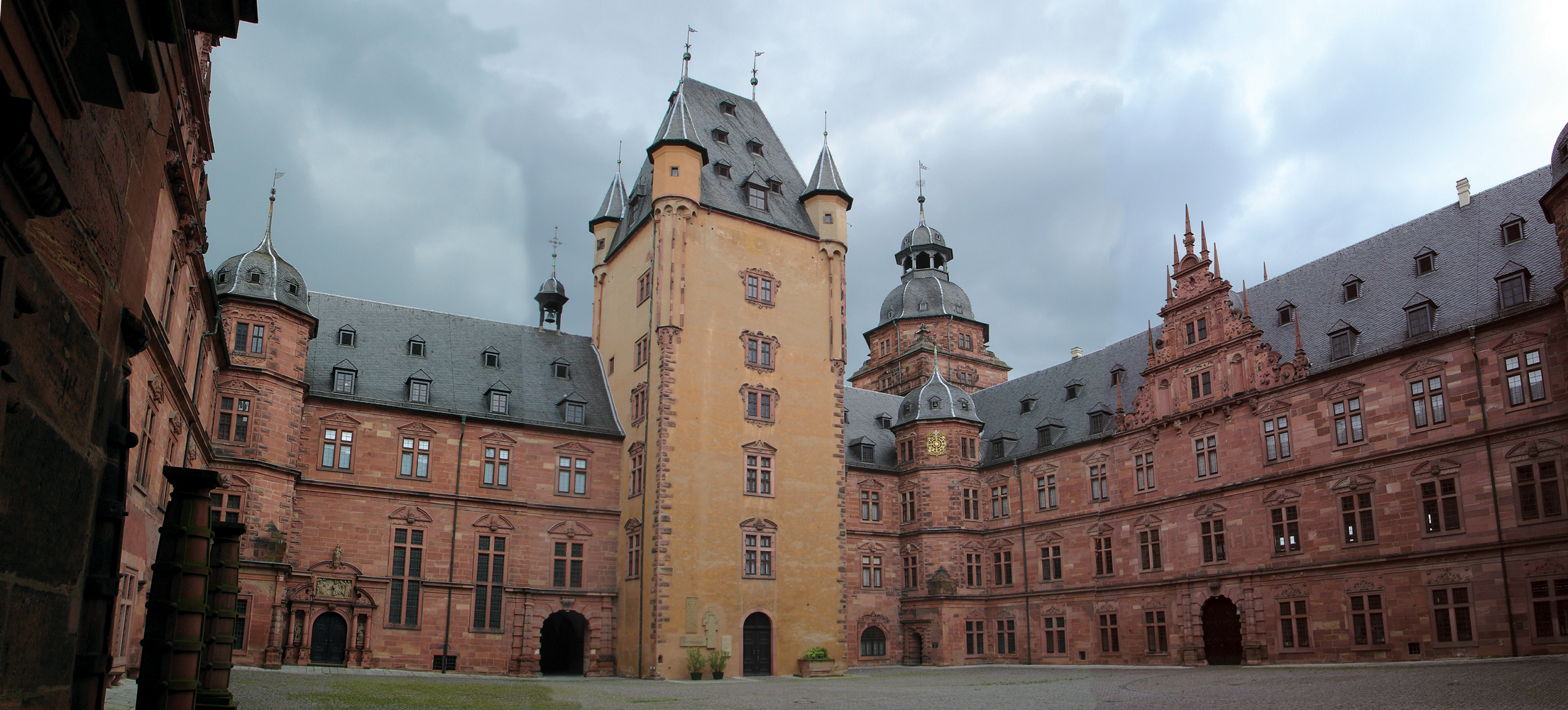 Schloss johannisburg in aschaffenburg